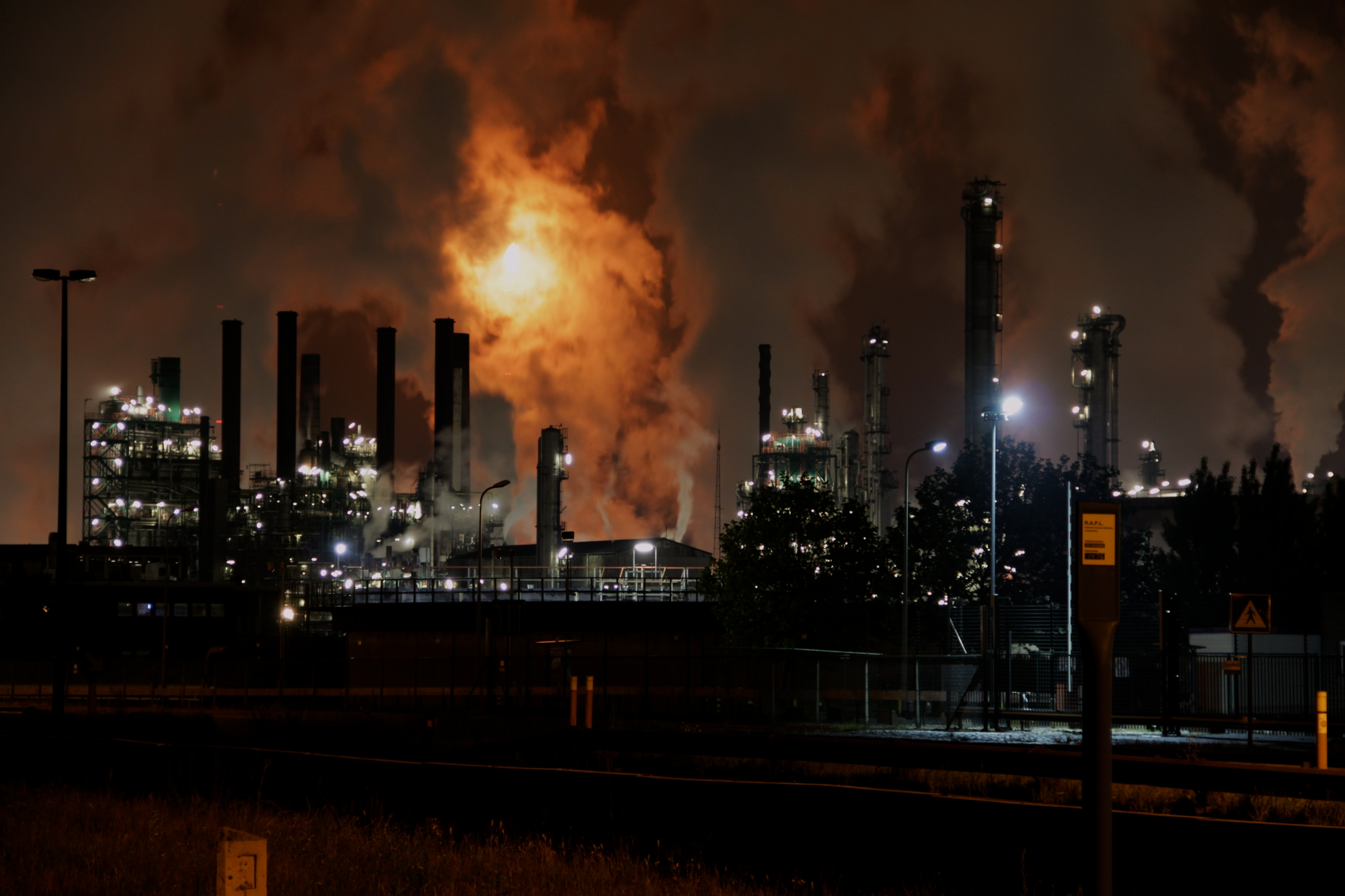 Hell